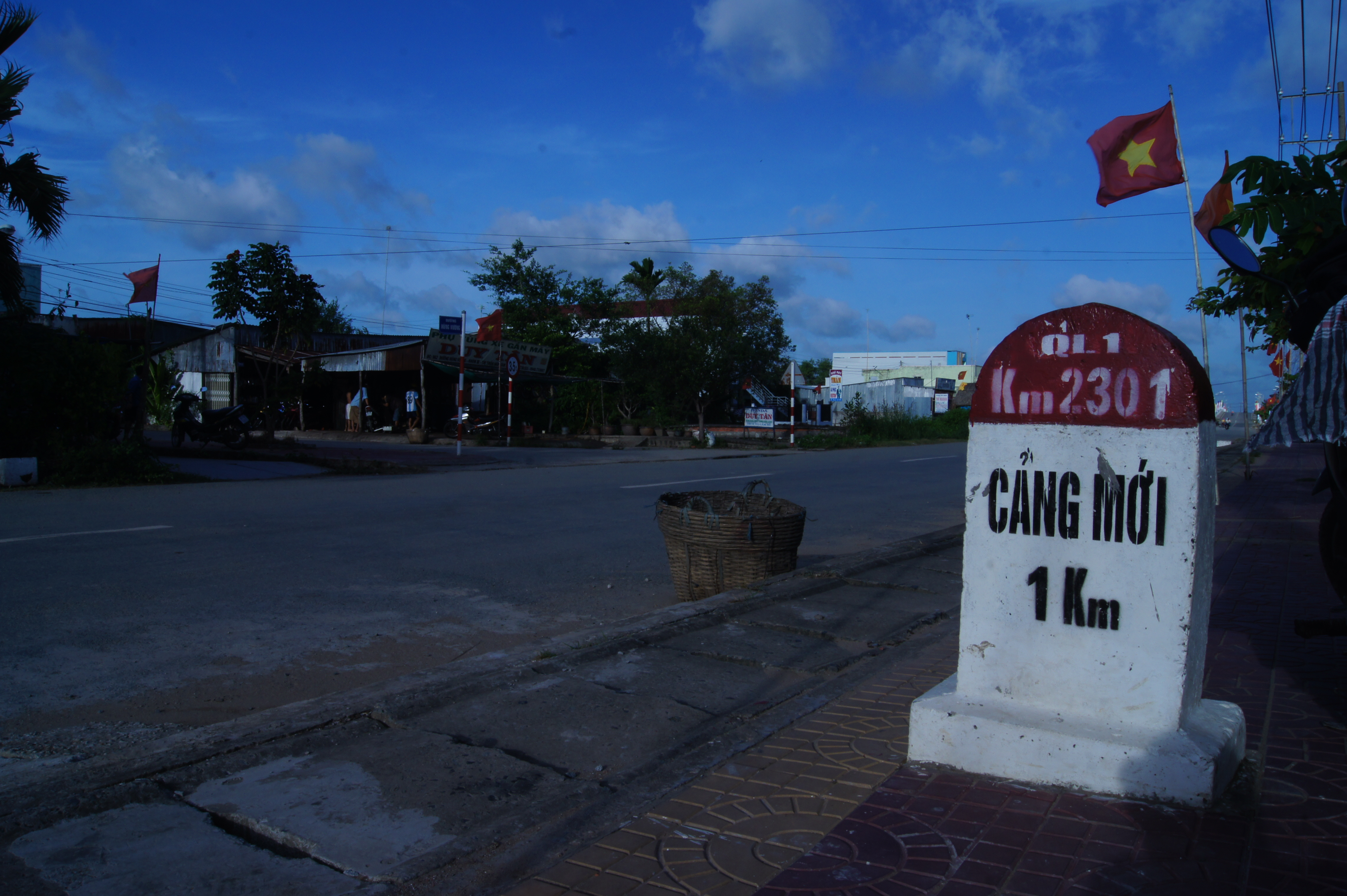 Quốc lộ 1 A tại km cuối cùng ở Năm Căn, Cà Mau, Việt Nam